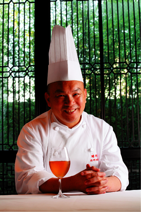 聘珍樓が撮影しております。